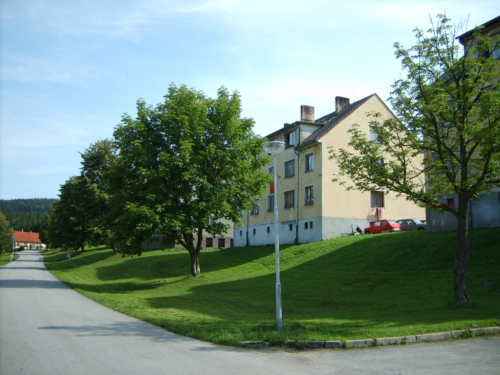 Housing unit in Pohorská Ves